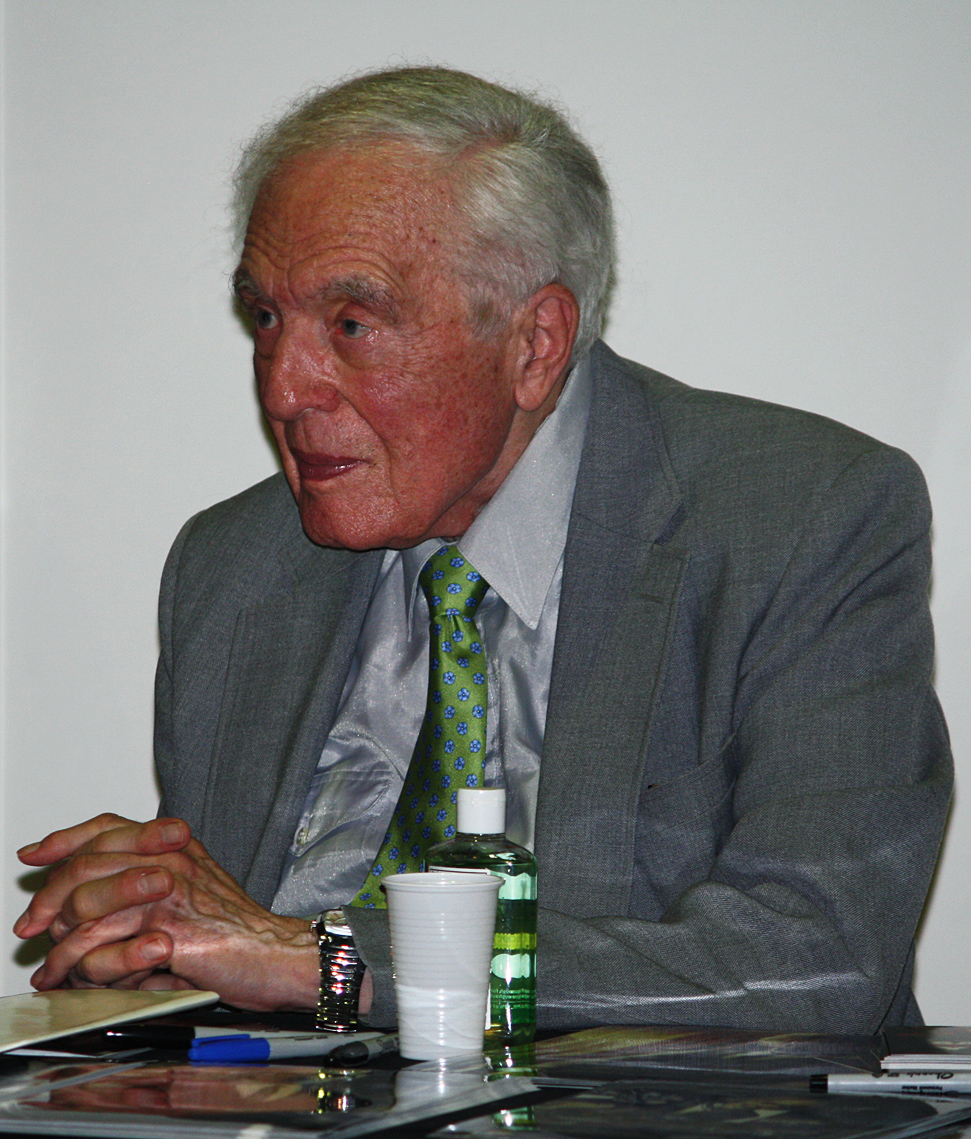 Angus Scrimm auf der 9. Weekend of Horrors in Bottrop (NRW)